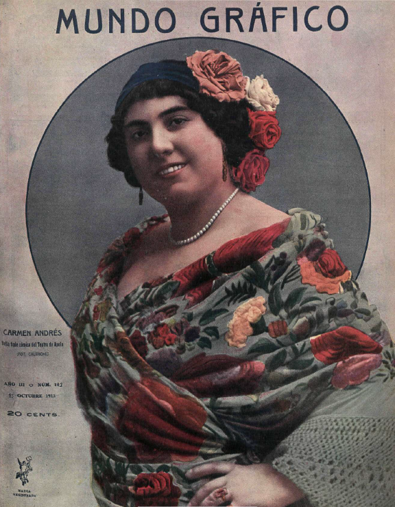 Fotografía de la actriz española Carmen Andrés publicada en 1913 en la portada de la revista Mundo Gráfico